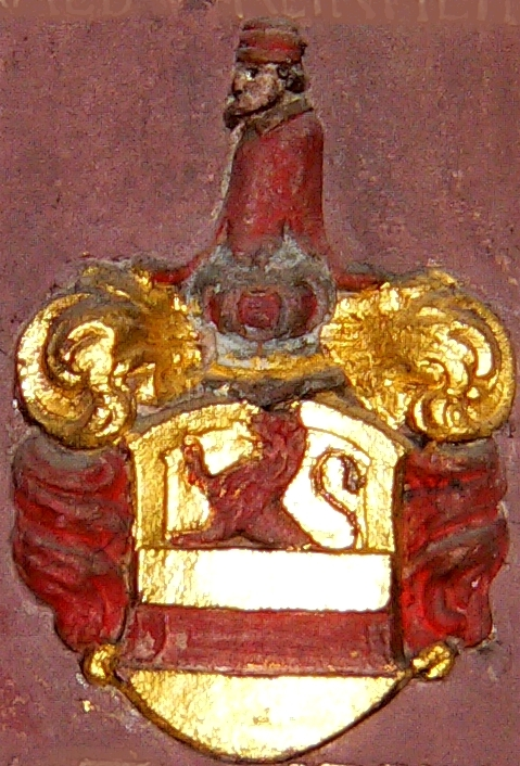 Wappen der Vorfahren von Christoffel Eitel von Schutzbar und Frau auf ihrem Epitaph in der ev. Kirche in Treis an der Lumbda (Hessen, Deutschland). Männliche Linie: 01m - 16m; weibliche Linie: 01w - 16w.